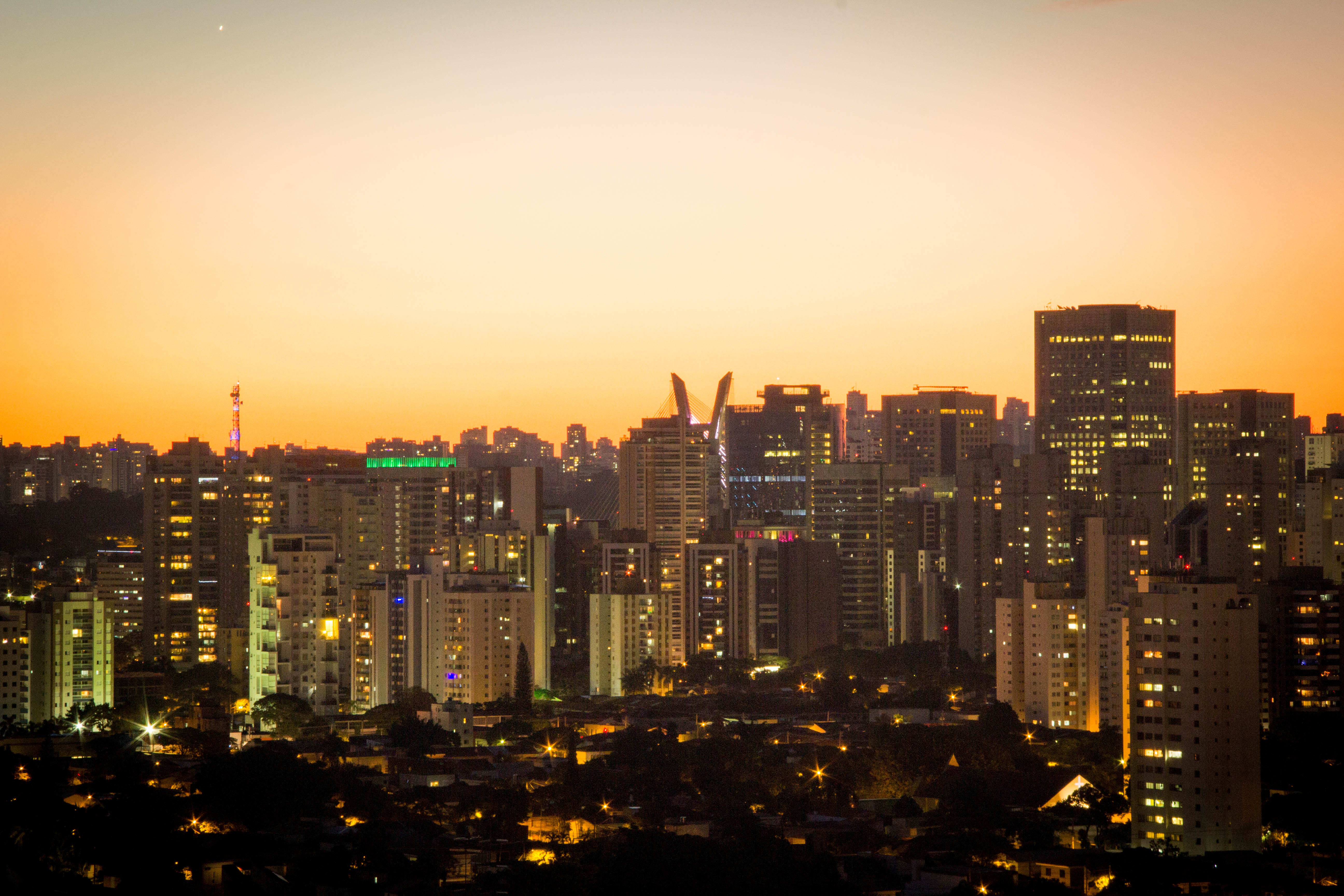 Vista de São Paulo, Brasil.